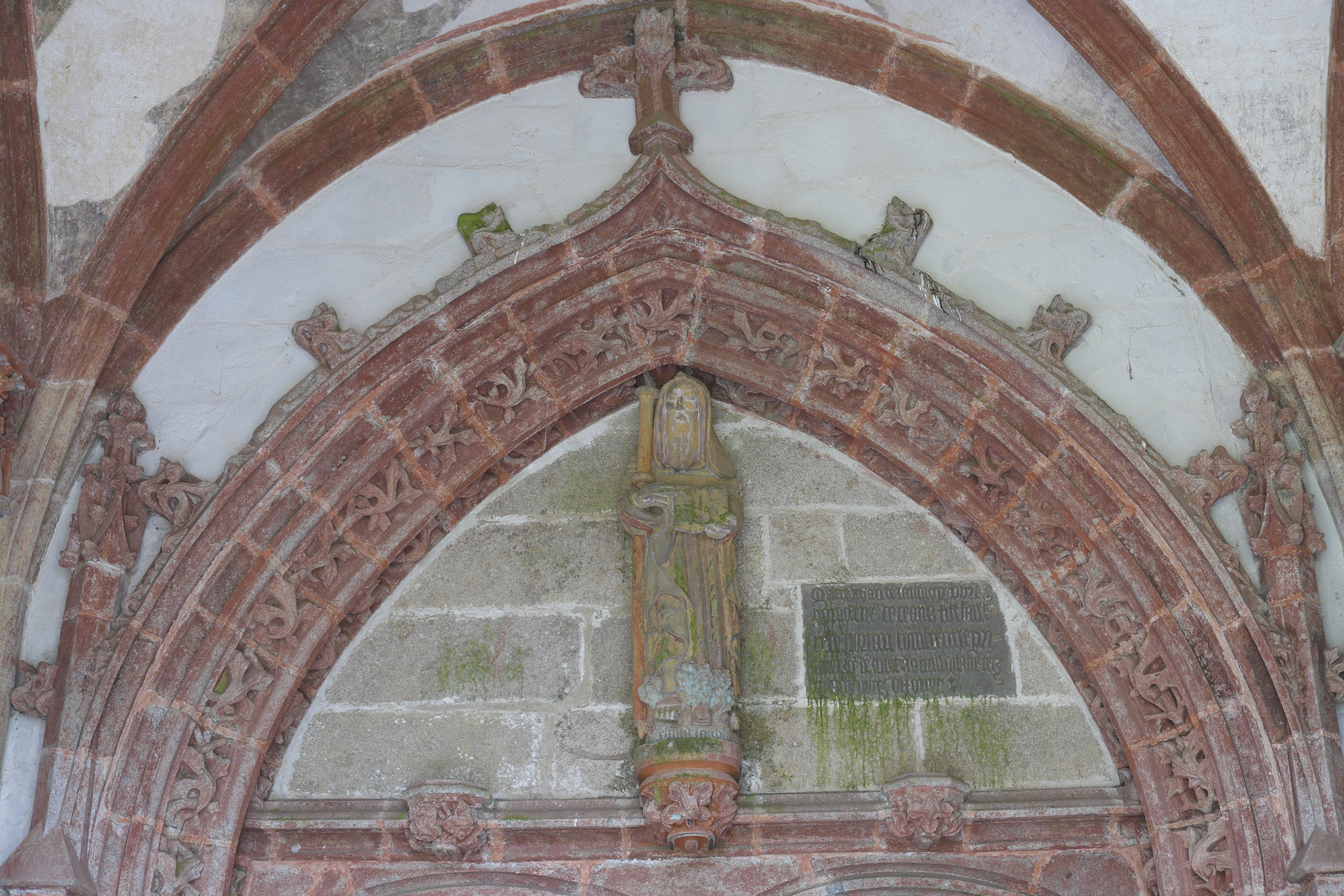 Kapelle Saint-Herbot in Saint-Herbot (Plonévez-du-Faou) im Département Finistère (Region Bretagne/Frankreich), inneres Portal in der südlichen Vorhalle